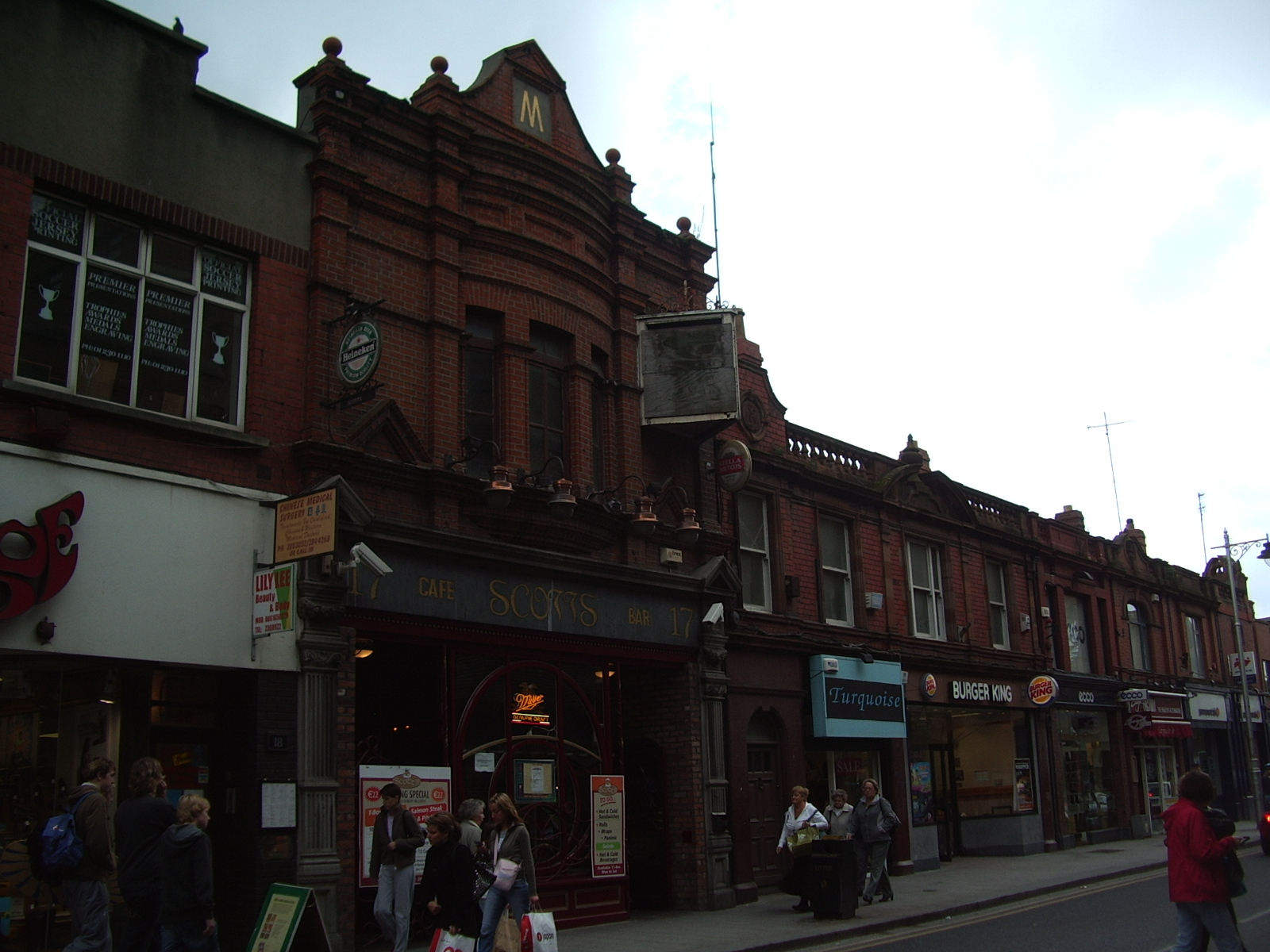 Dun Laoghaire